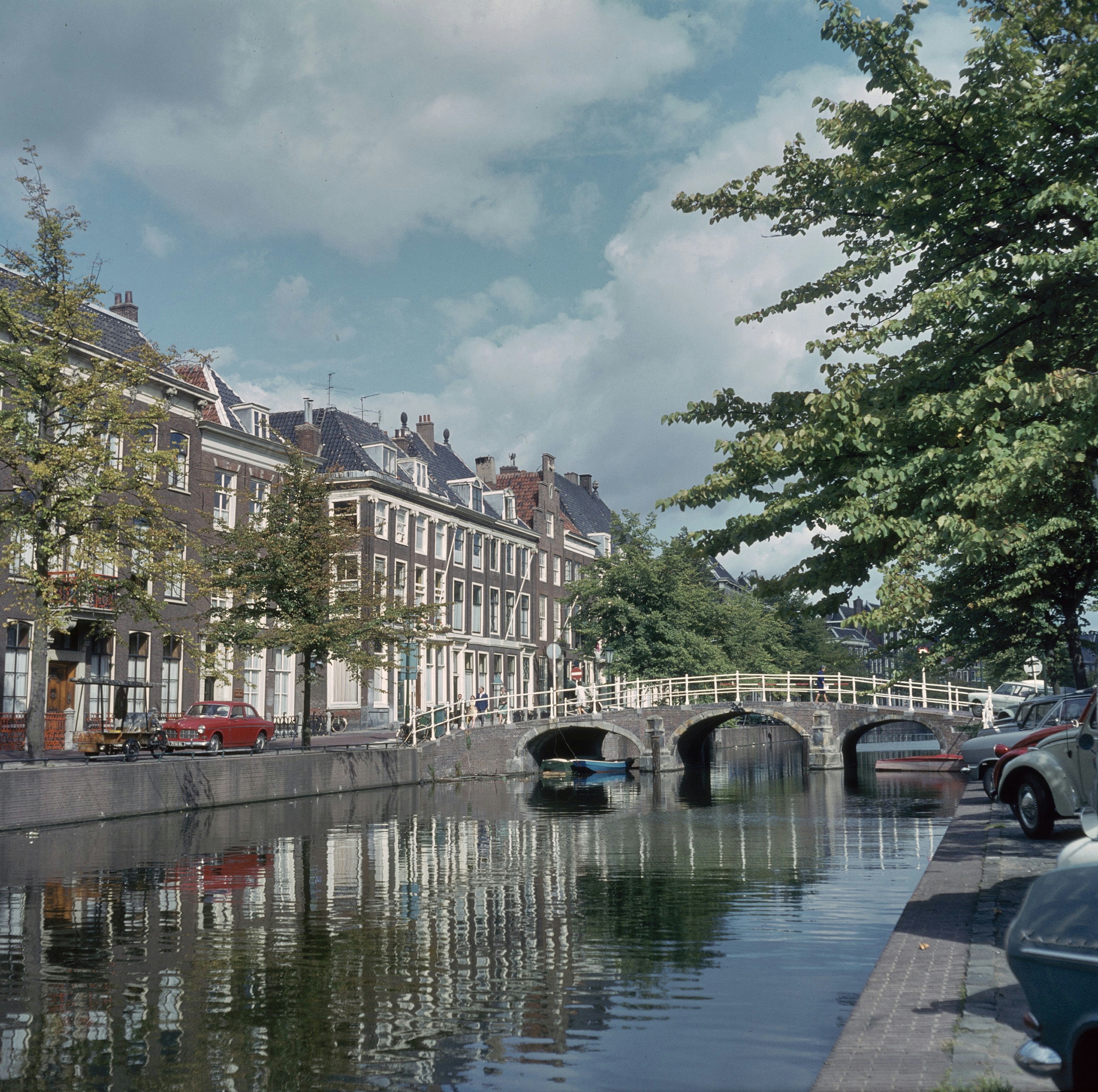 Exterieur OVERZICHT VOORGEVELS